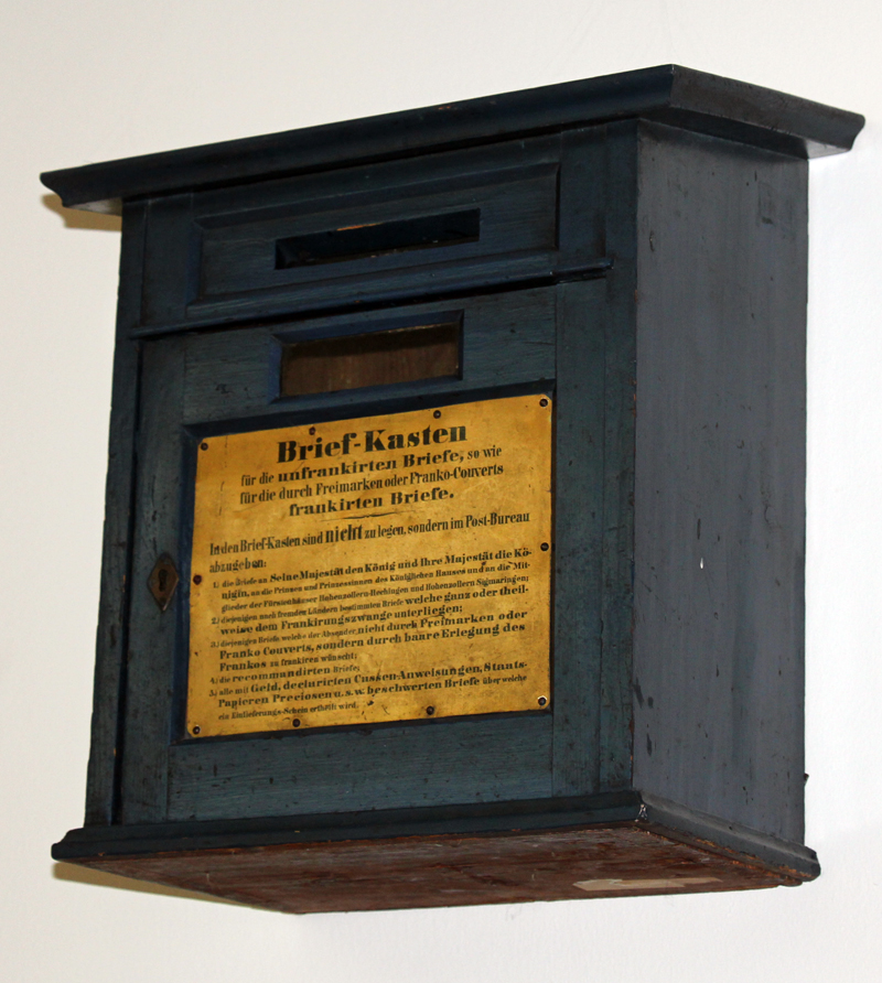 Postbriefkasten der königlich preußischen Post um 1850